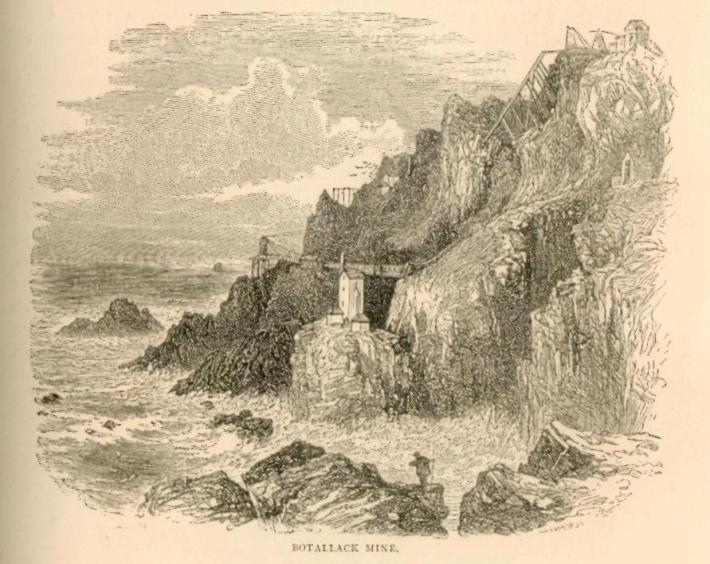 mine de Cornouailles Source : English pictures drawn with pen and pencil By the Rev. Samuel Manning, LL.D., and the Rev. S. G. Green, D.D. London, The religious tract society Vers 1850